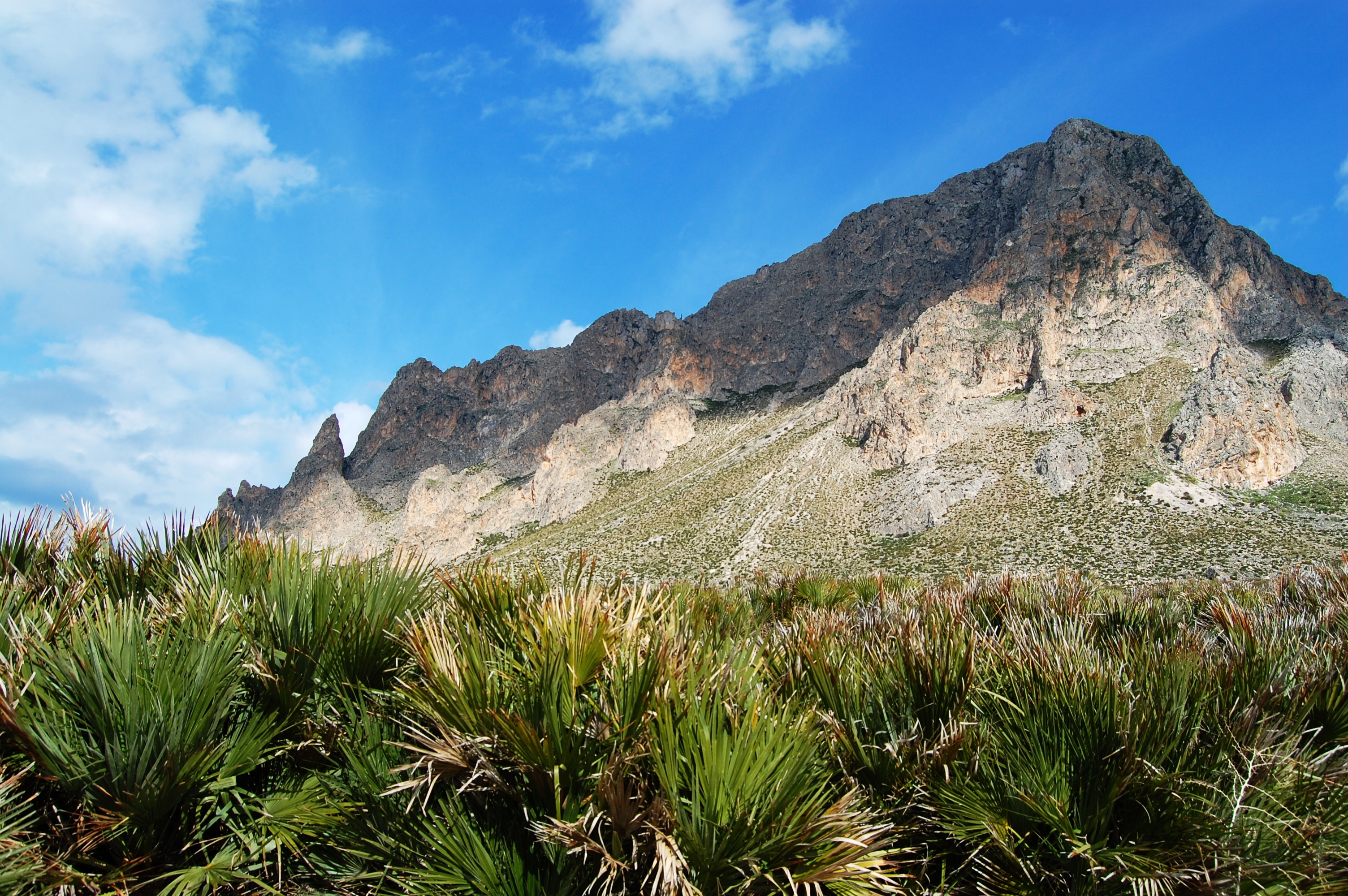 Riserva naturale Monte Cofano, Sicily